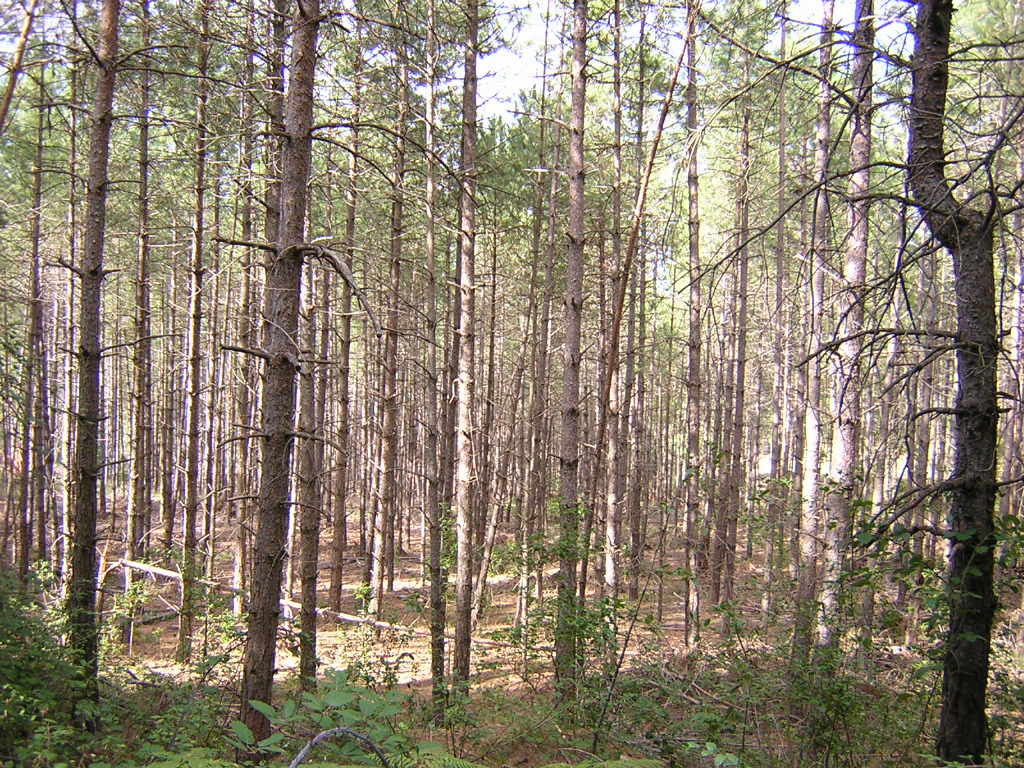 Els Avellaners del Pere Pla (Monistrol de Calders, Moianès)